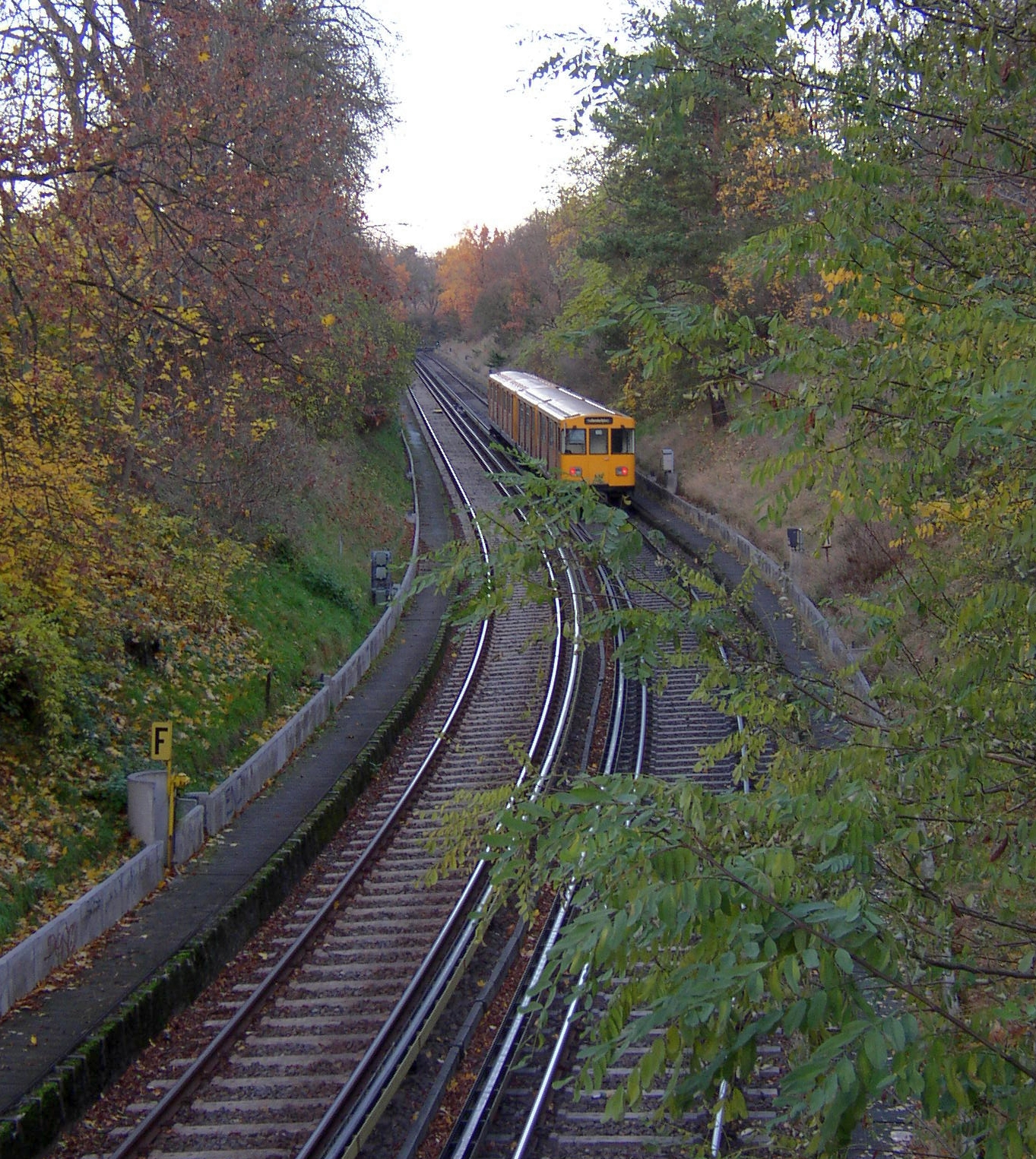 Einschnittbahn bei Dahlem-Dorf